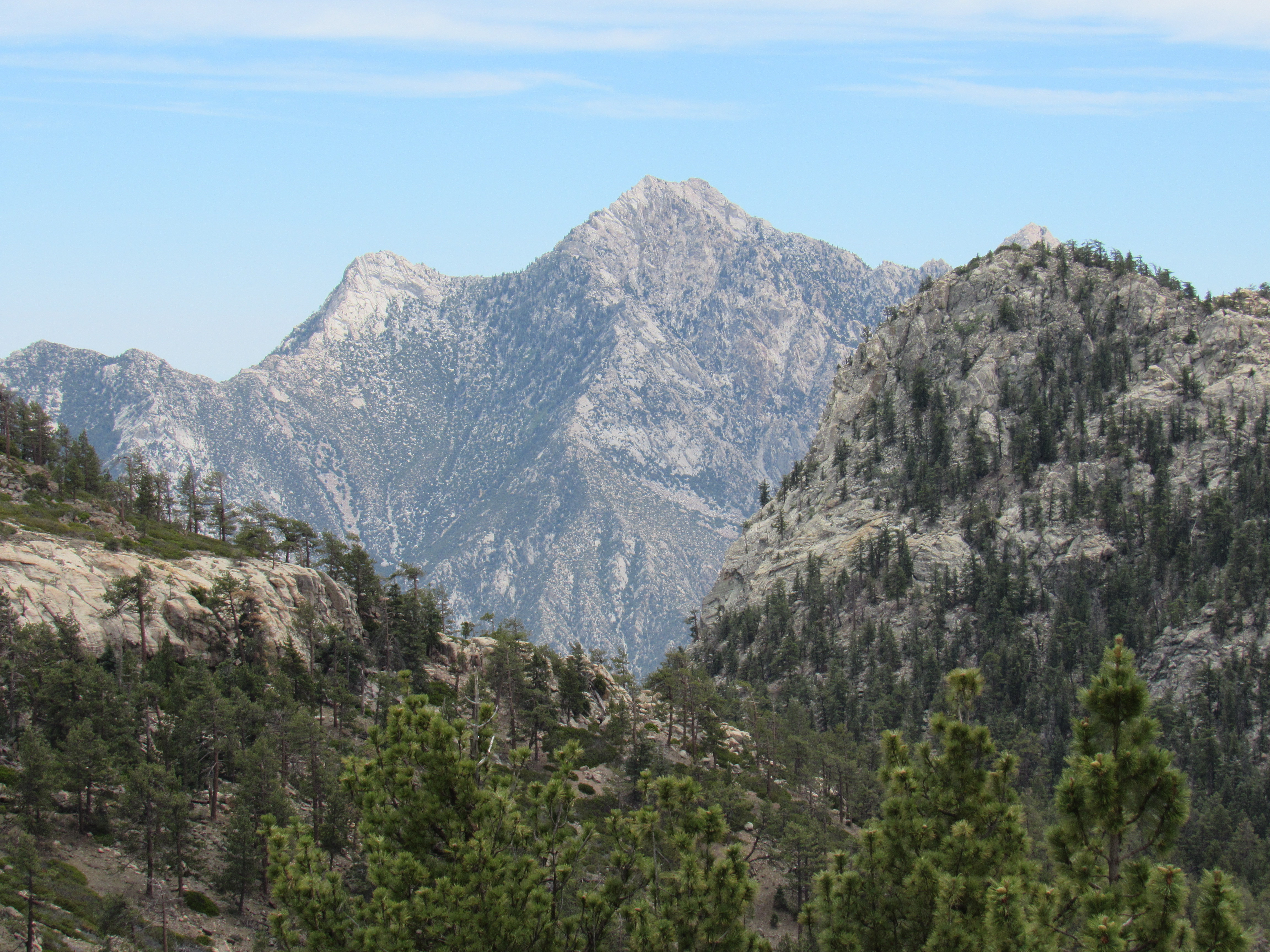 El cerro de La Encantada visto desde las inmediaciones del observatorio nacional de la sierra de San Pedro Mártir, en la cordillera del mismo nombre.